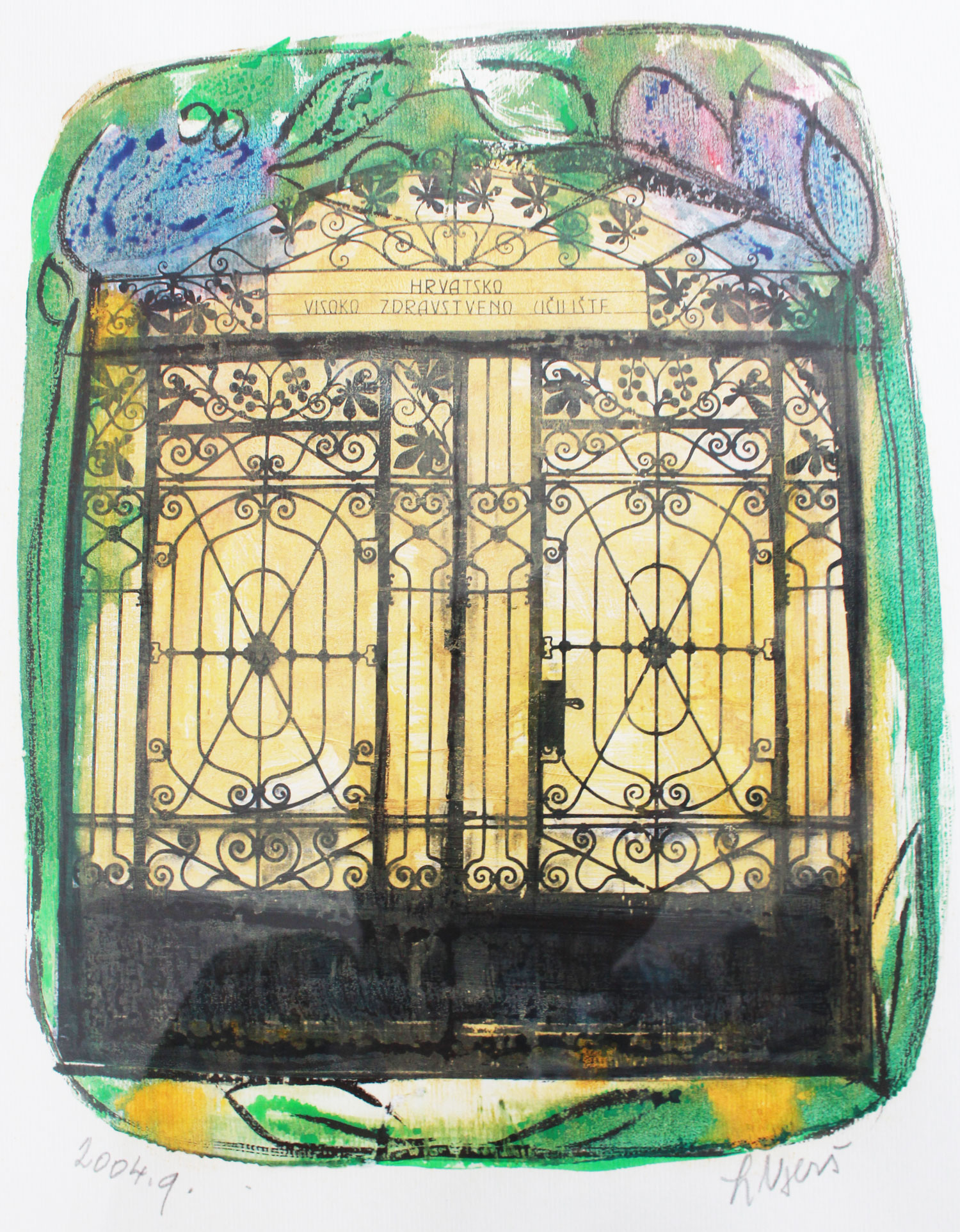 Vrata Zdravstvenog veleučilišta. Djelo akademske umjetnice Ljerke Njerš.